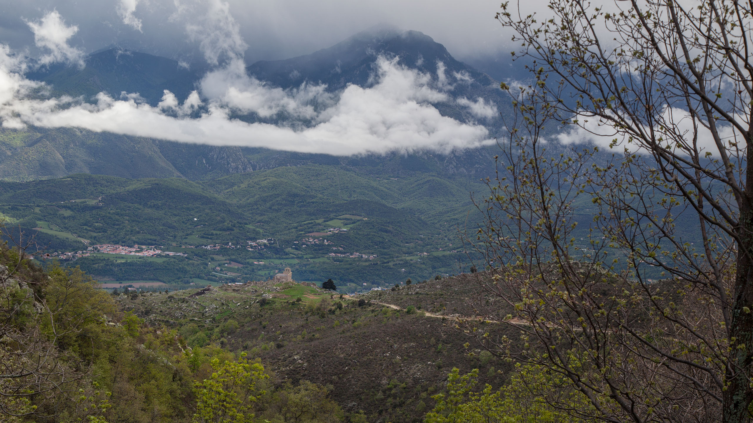 Vue lointaine